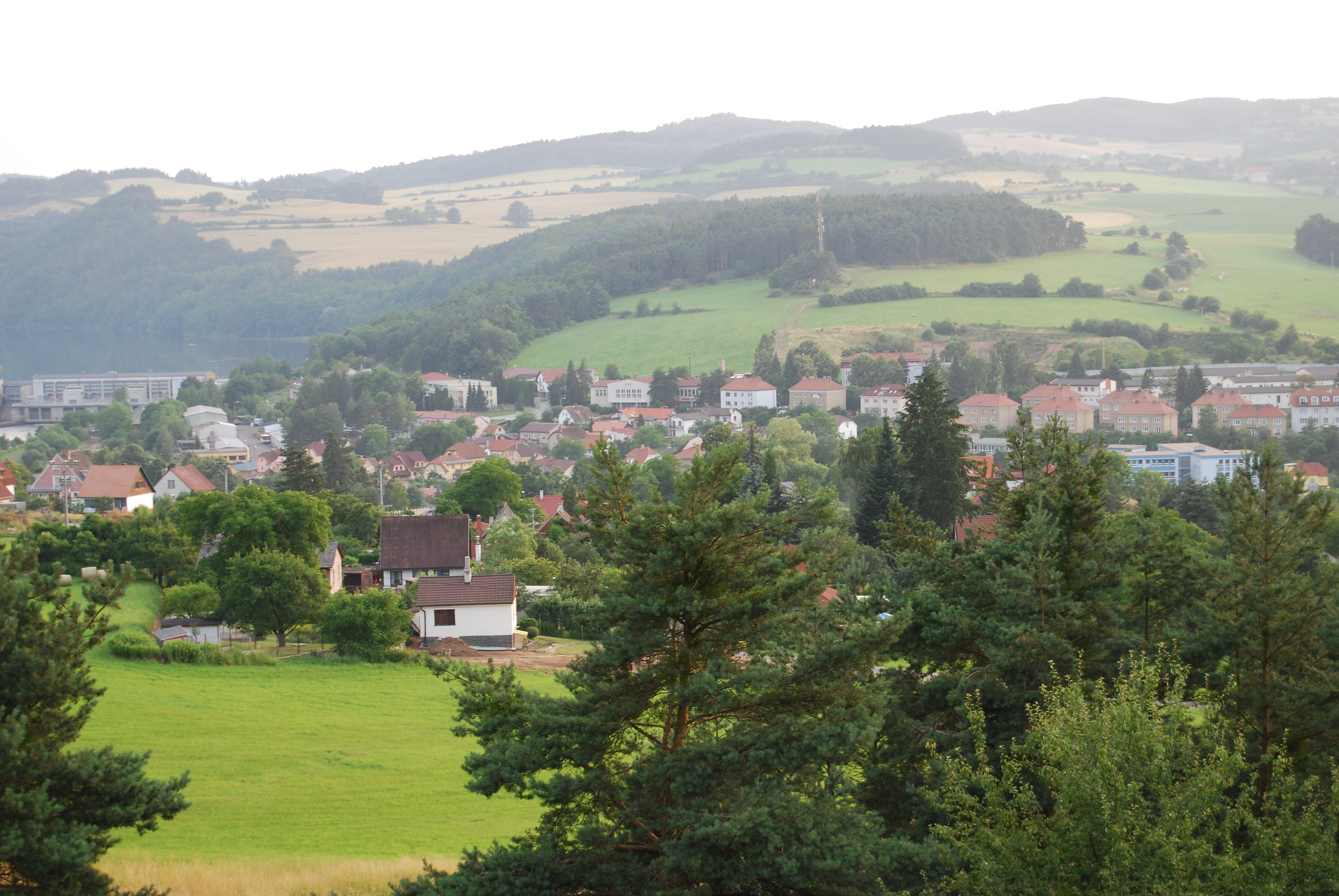 Rozhledna. Pohled z rozhledny směrem na Kamýk. Kamýk nad Vltavou. Okres Příbram. Česká republika. - Google Maps - Google Earth